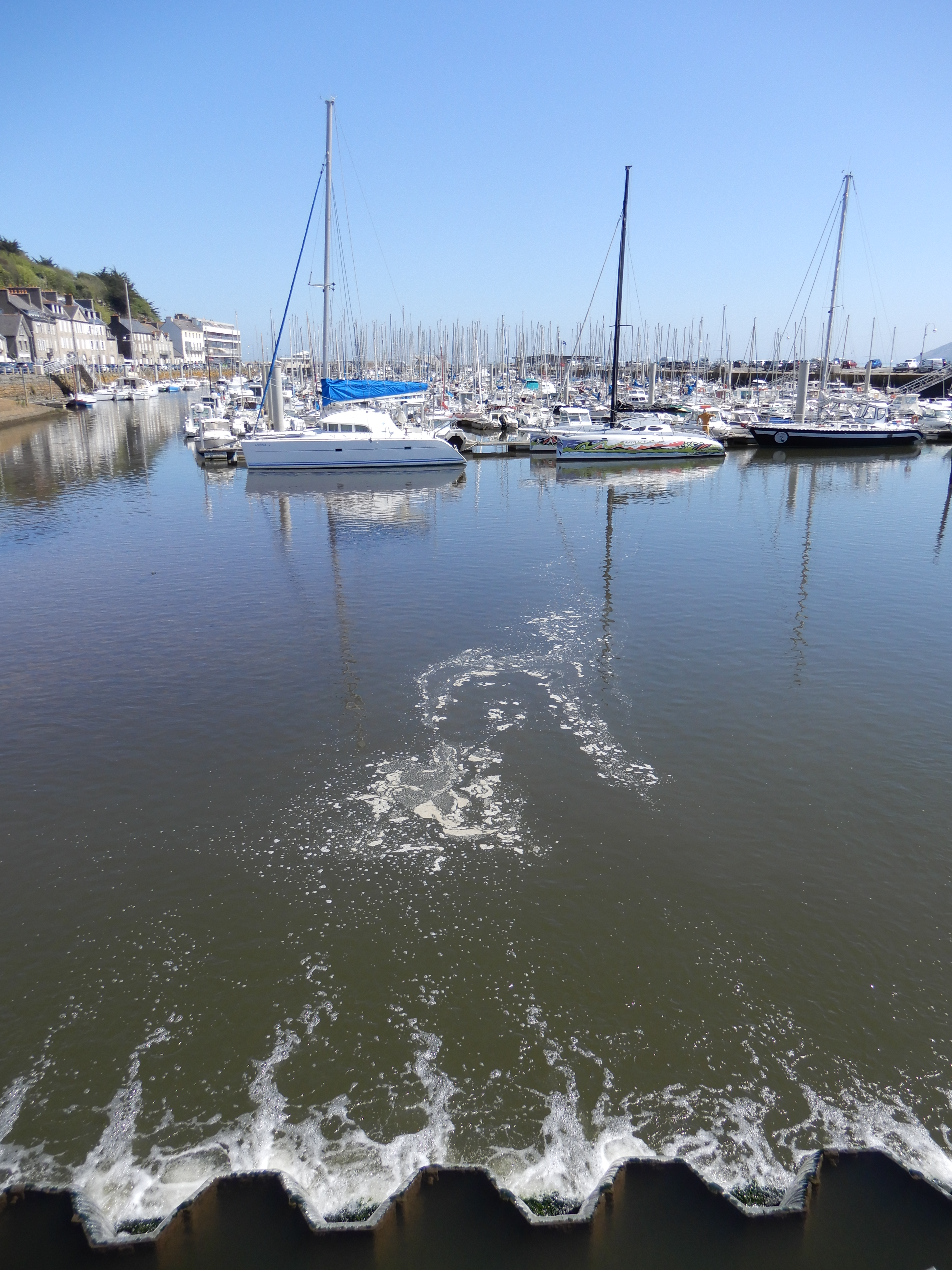 Binic, l'avant port